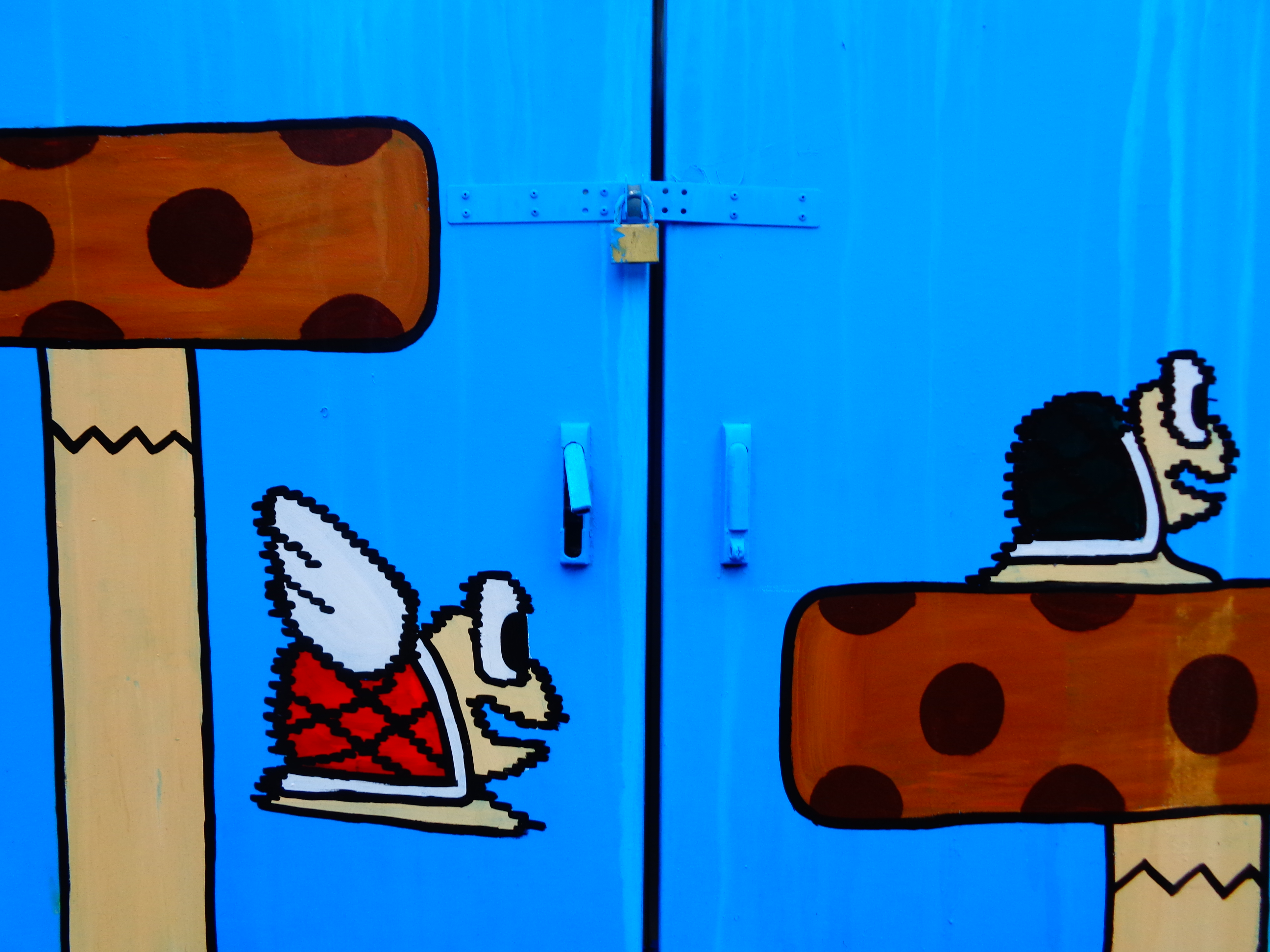 西安市新城区皇城西路与光辉巷丁字路口附近